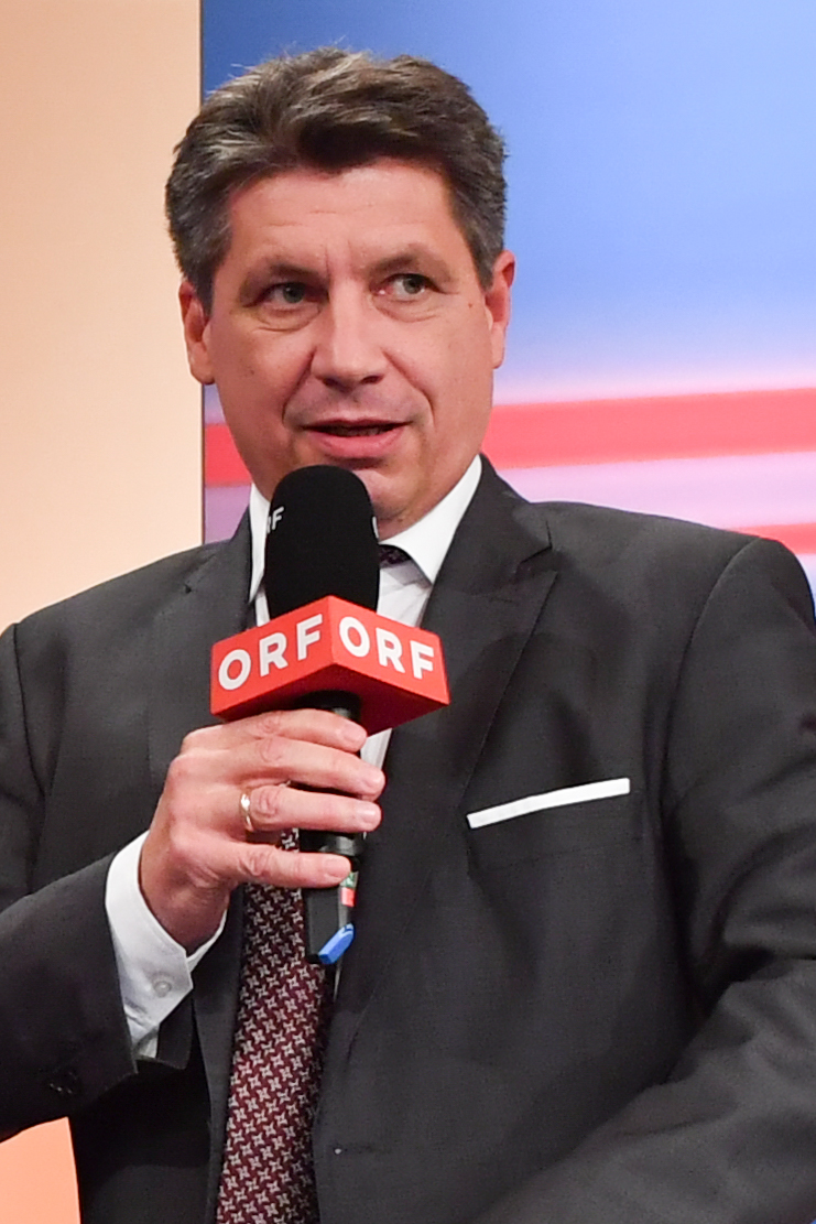 Wahl zum österreichischen Bundespräsidenten am 4. Dezember 2016. Bild zeigt Hans Bürger (ORF).